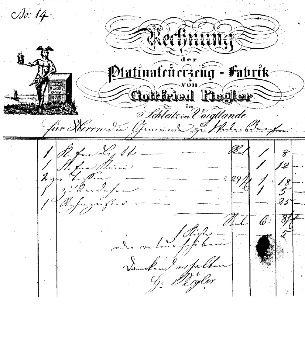 Rechnung des Schleizer Feuerzeugfabrikanten Gottfried Piegler